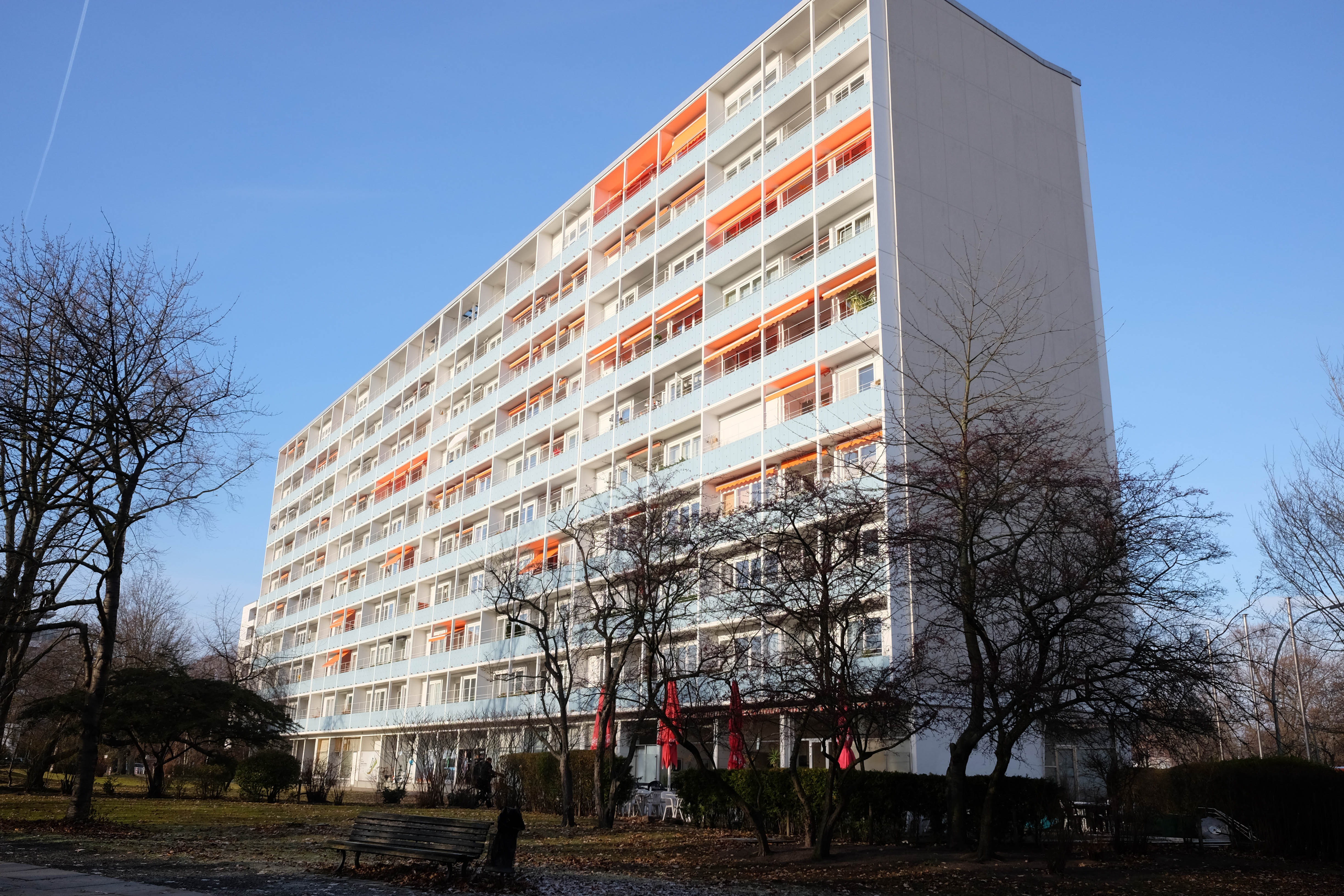 Schwedenhaus mit Café Tiergarten, Hansaviertel